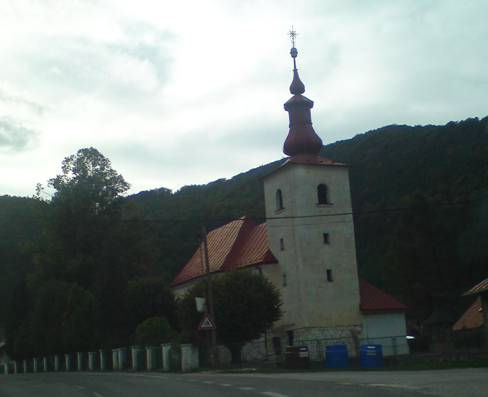 Kostol vo Fačkove